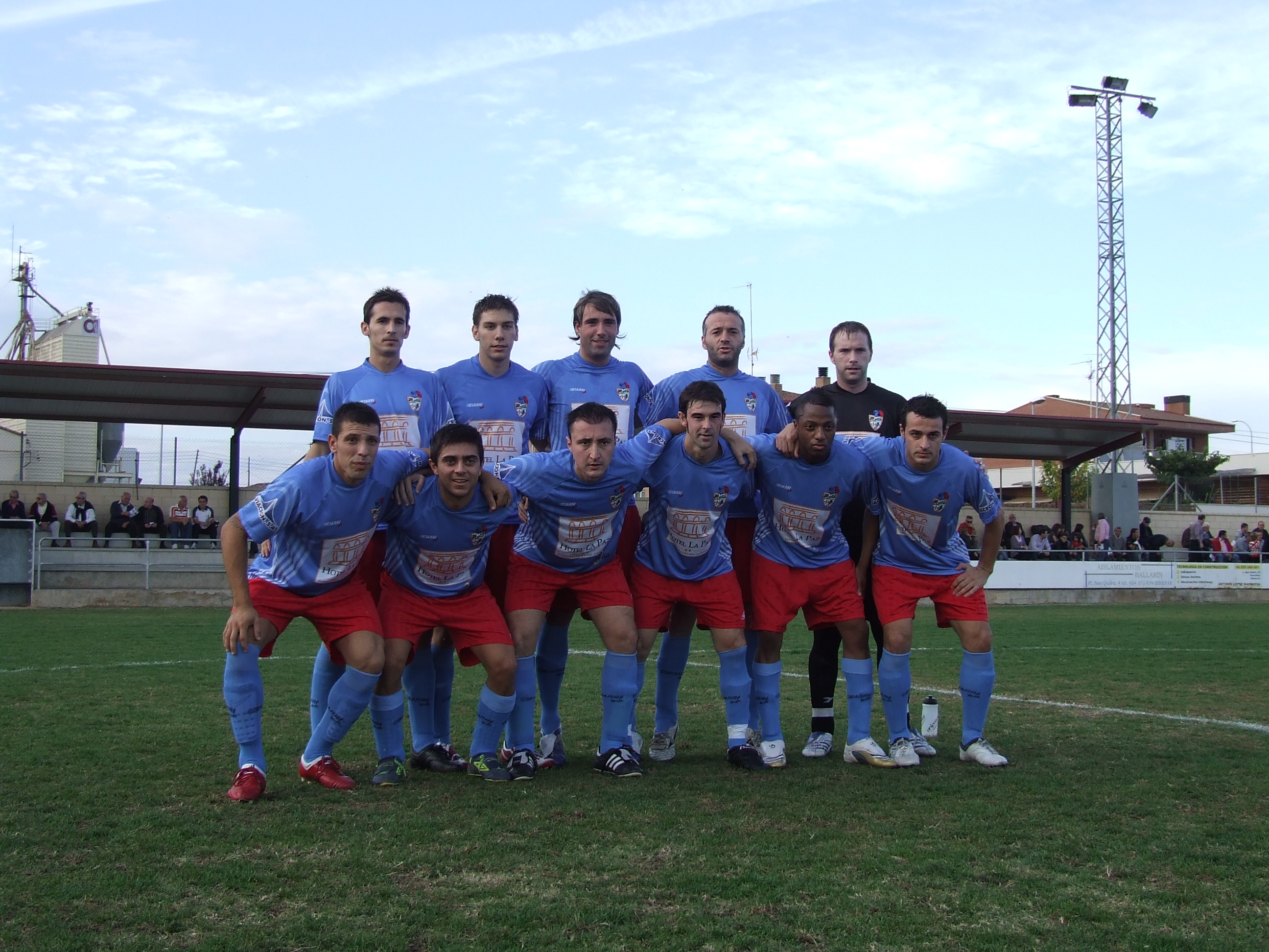 Altorricón 1 - Binéfar 0 (25-10-2009)